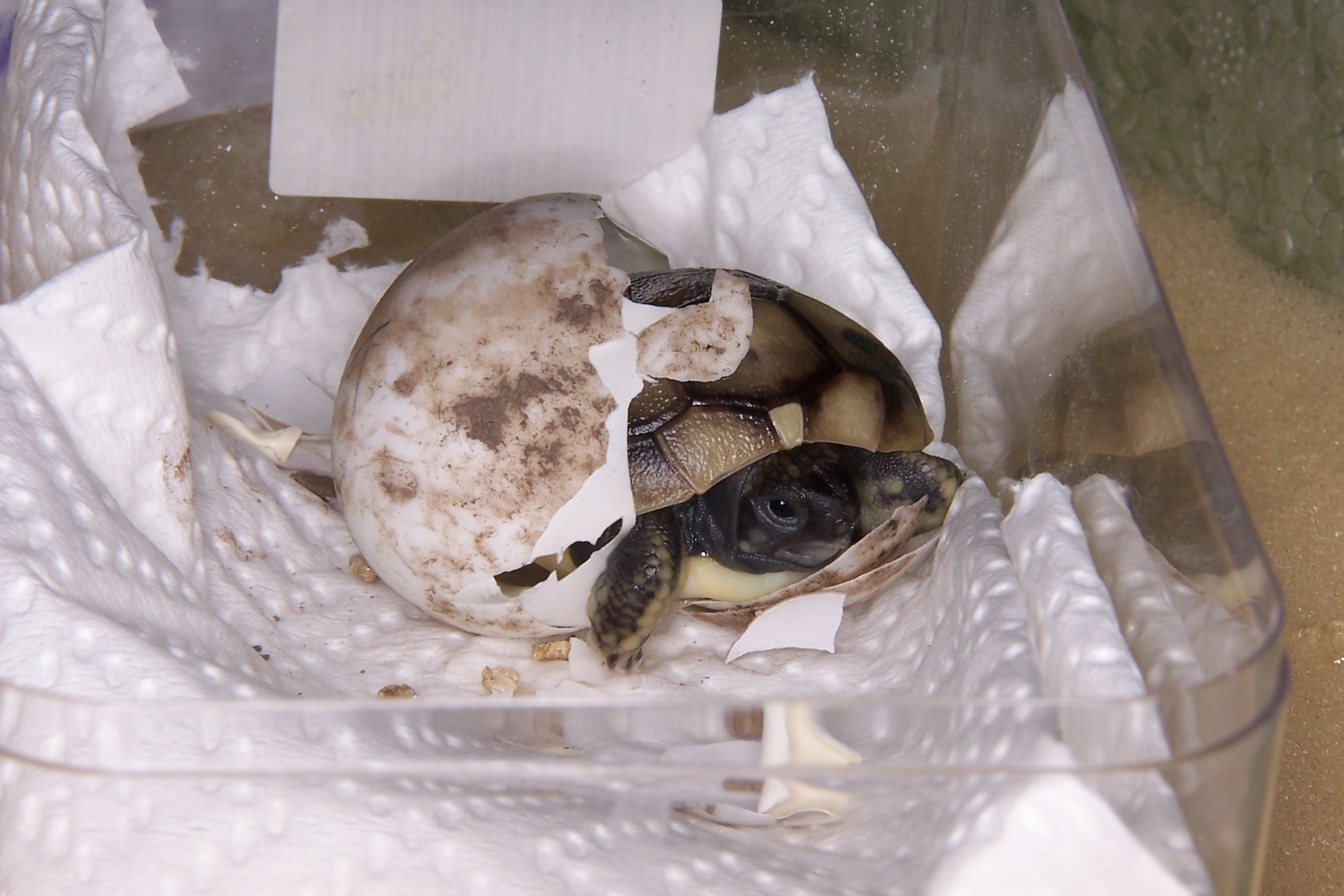 Testudo hermanni 12:32 beim Schlupf